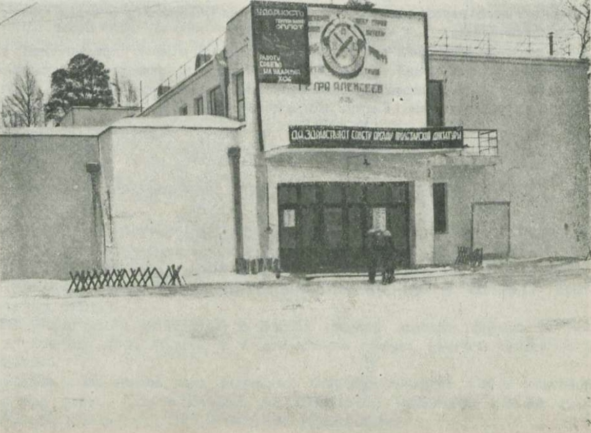 Клуб фабрики имени Петра Алексеева. Главный фасад.